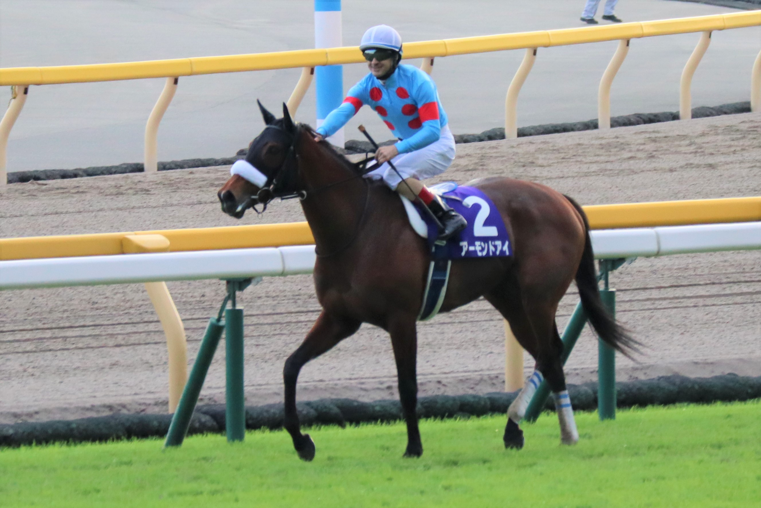 アーモンドアイ 第160回天皇賞 優勝時 ウイニングラン